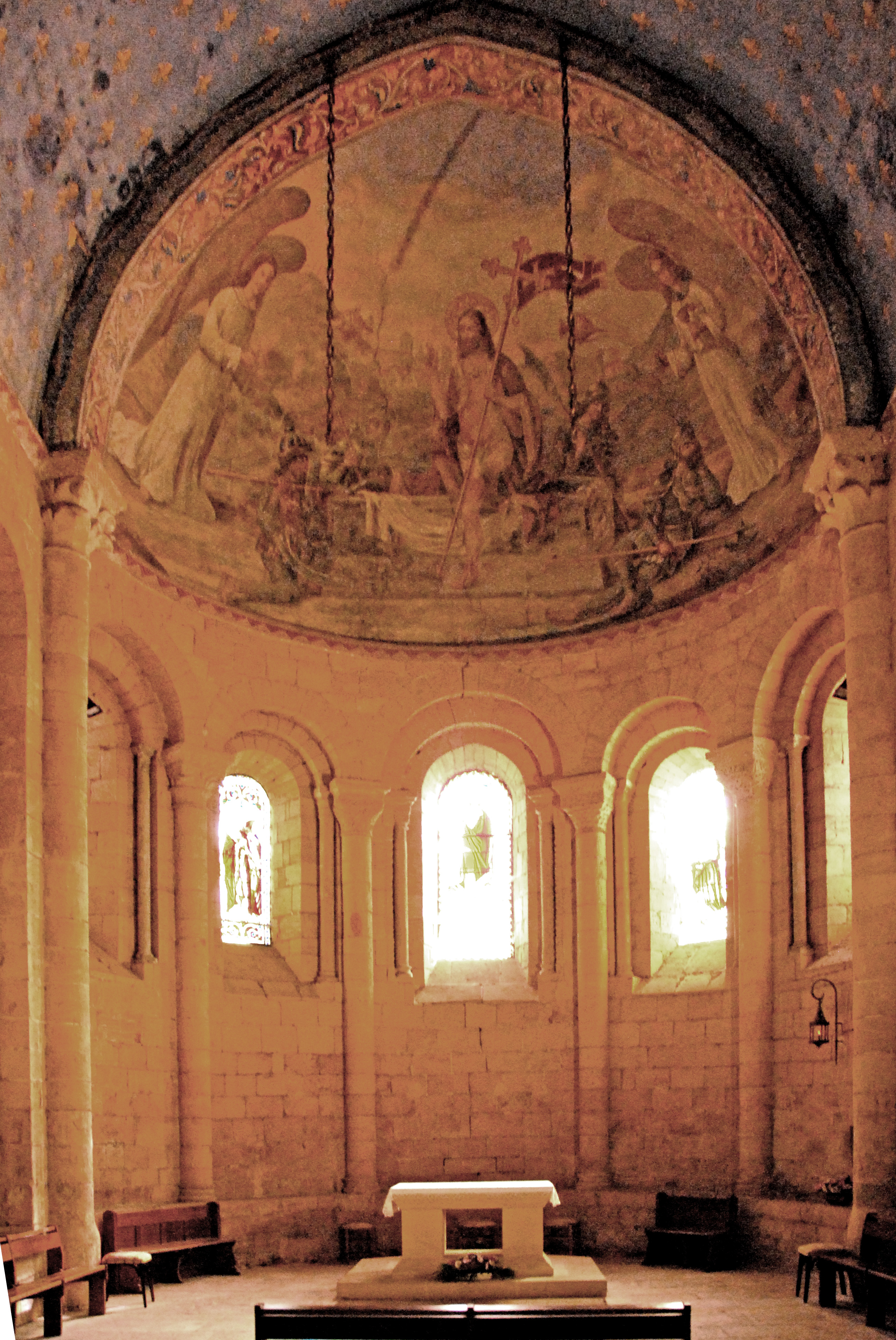 Cadouin, Chor